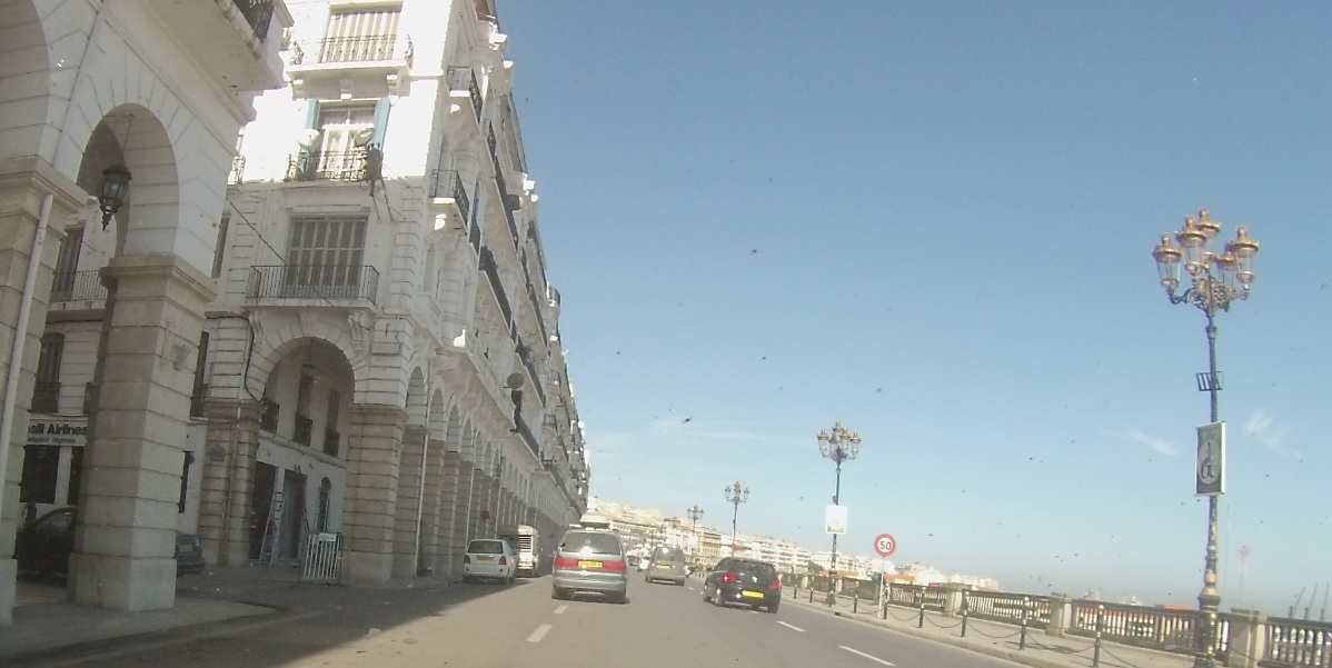 Boulevard Zighoud Youcef à Alger